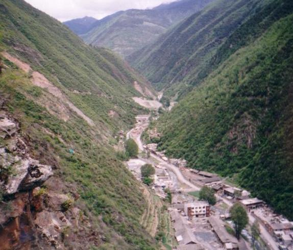 zh: 马尔康风景 en: Landscape in Mǎ'ěrkāng